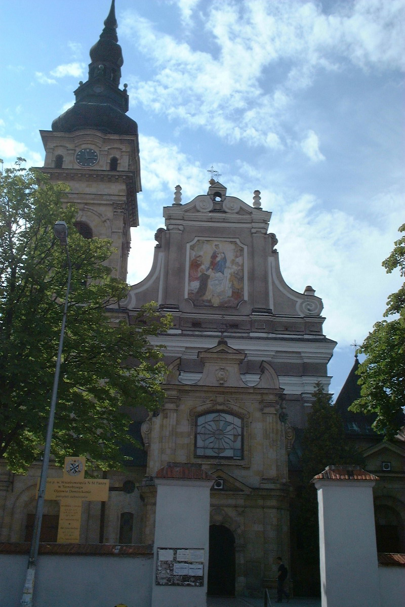 Poland, Tarnobrzeg - Monastery